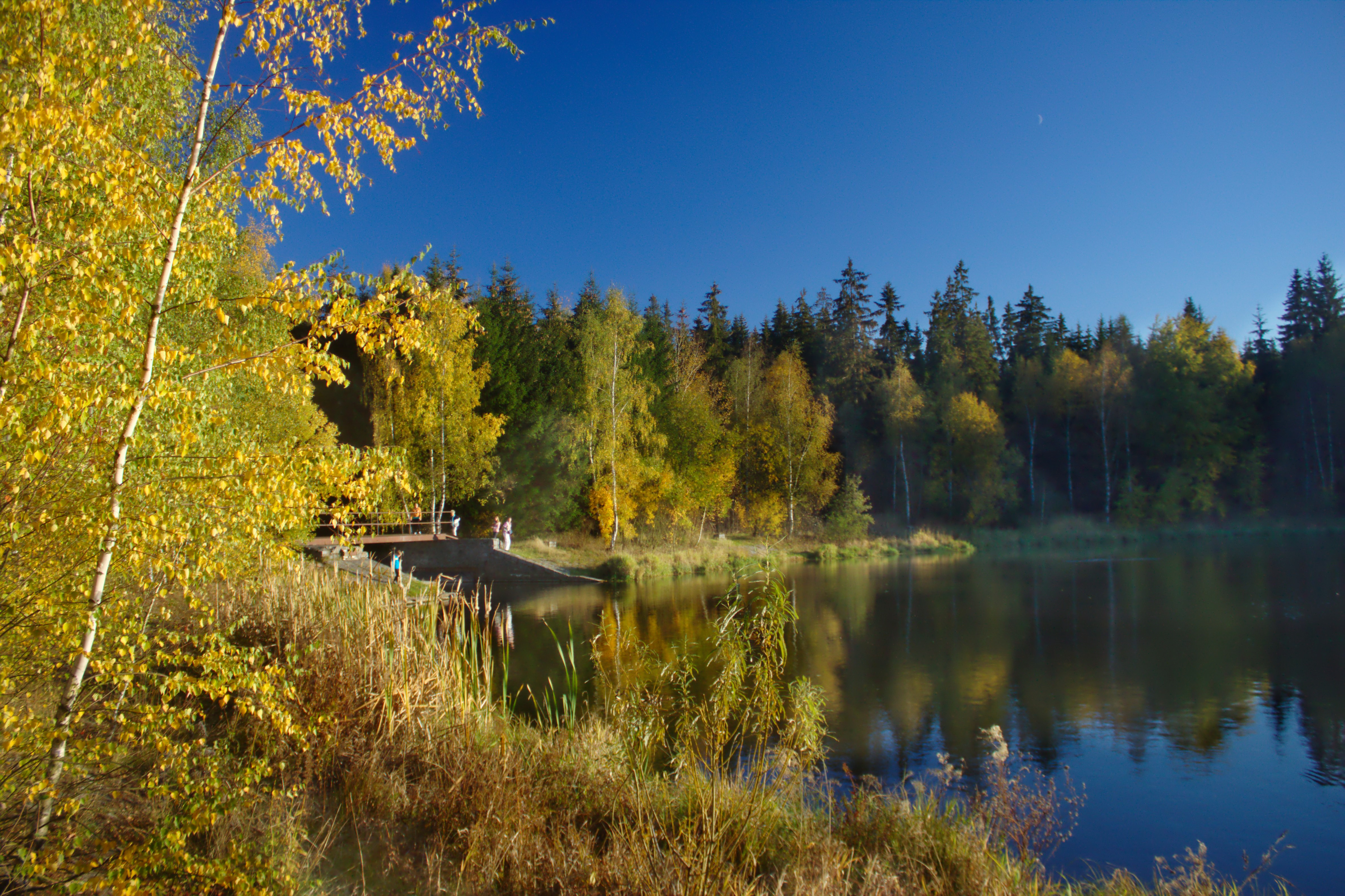 Břehy rybníka na říčce Svratka v obci Svratka, kraj Vysočina